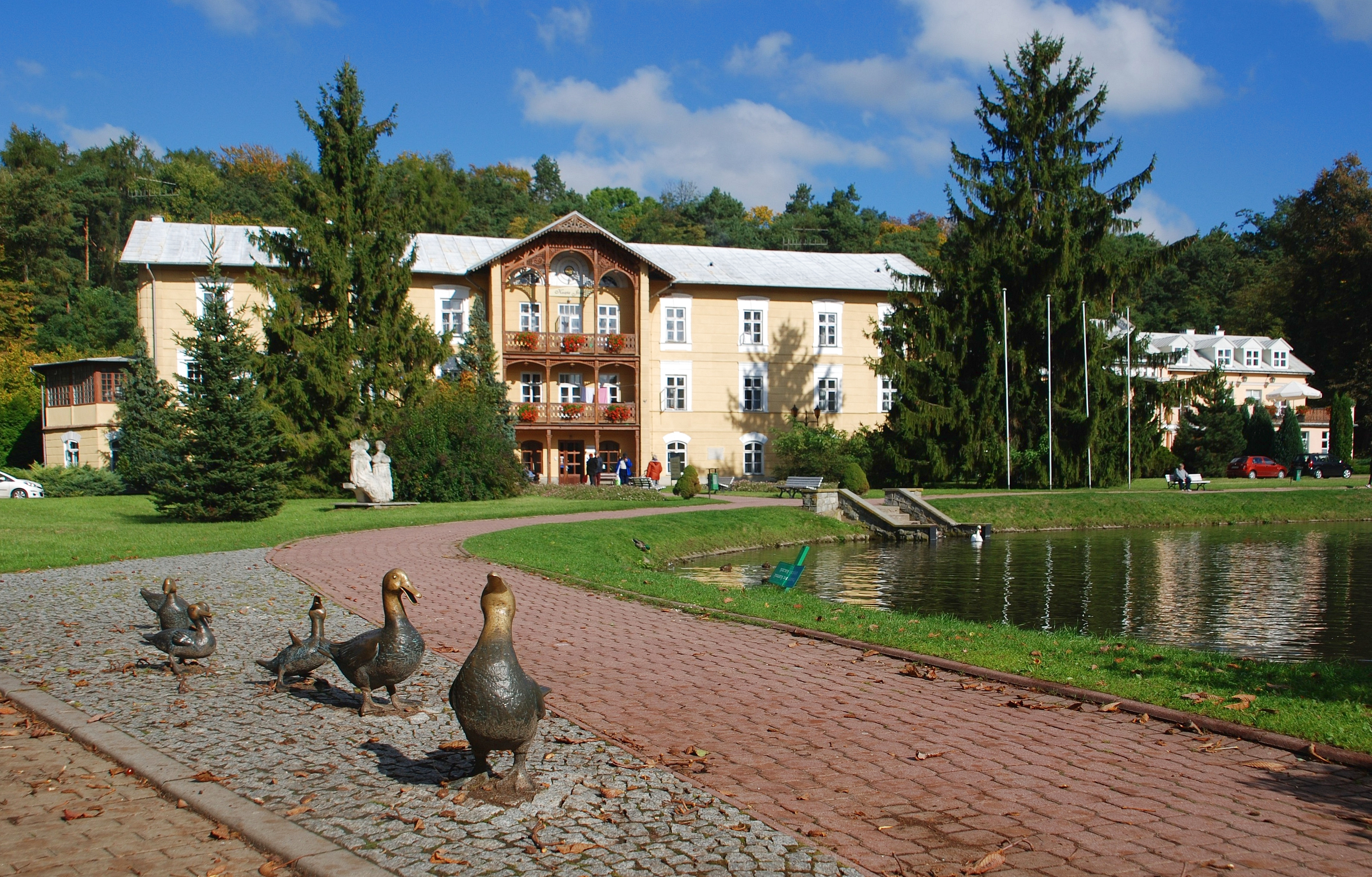 miasto Nałęczów